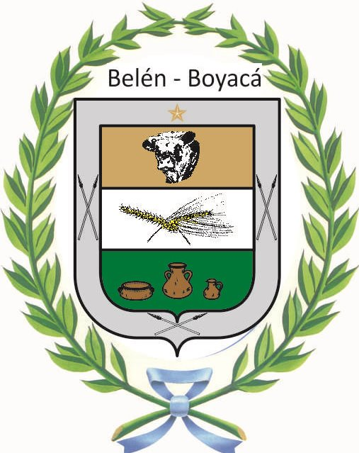 Escudo de Belén Boyacá - Colombia